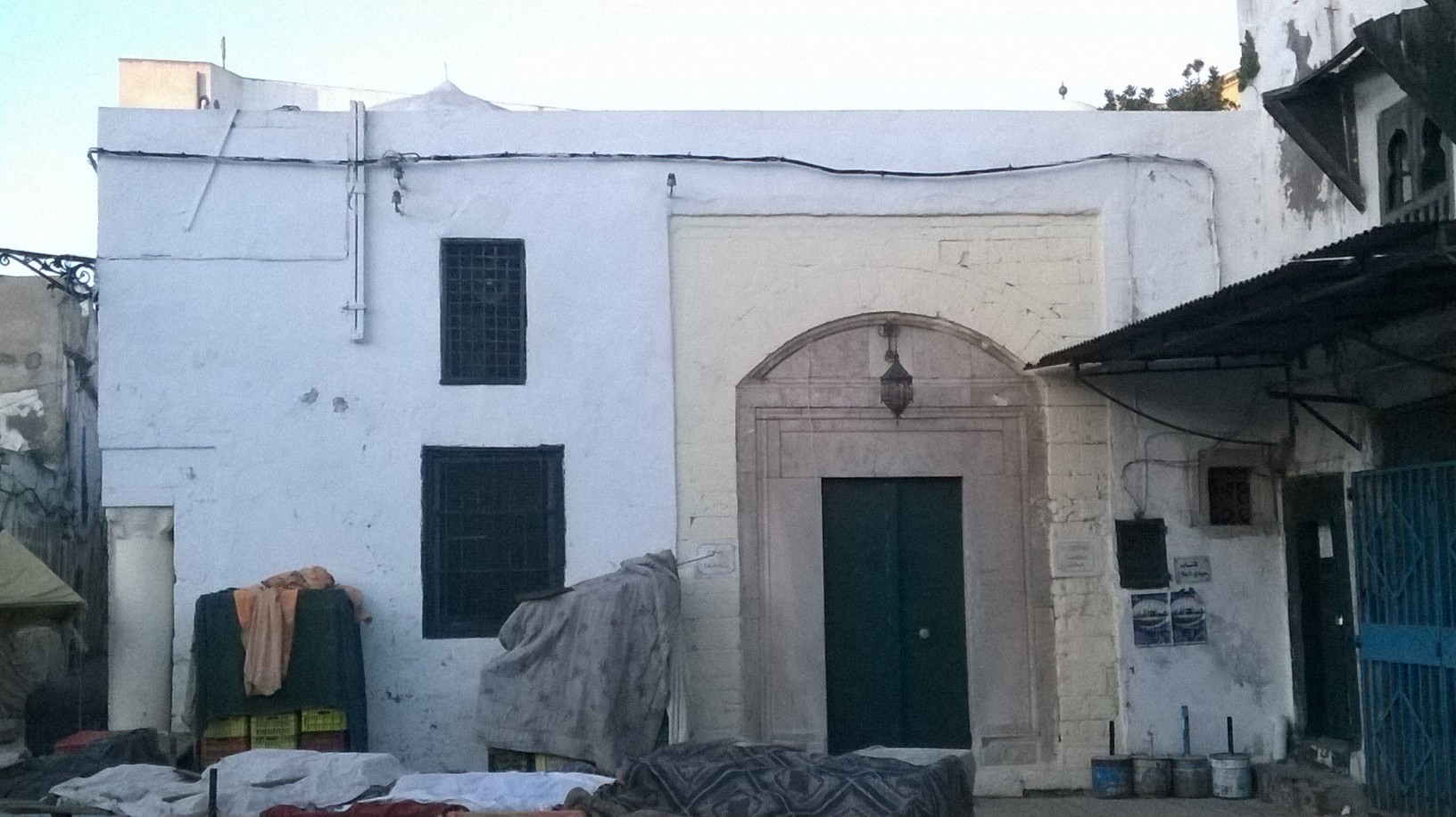 El Halfaouine, Bab Souika , Tunis الحلفاوين, باب سويقة ، تونس